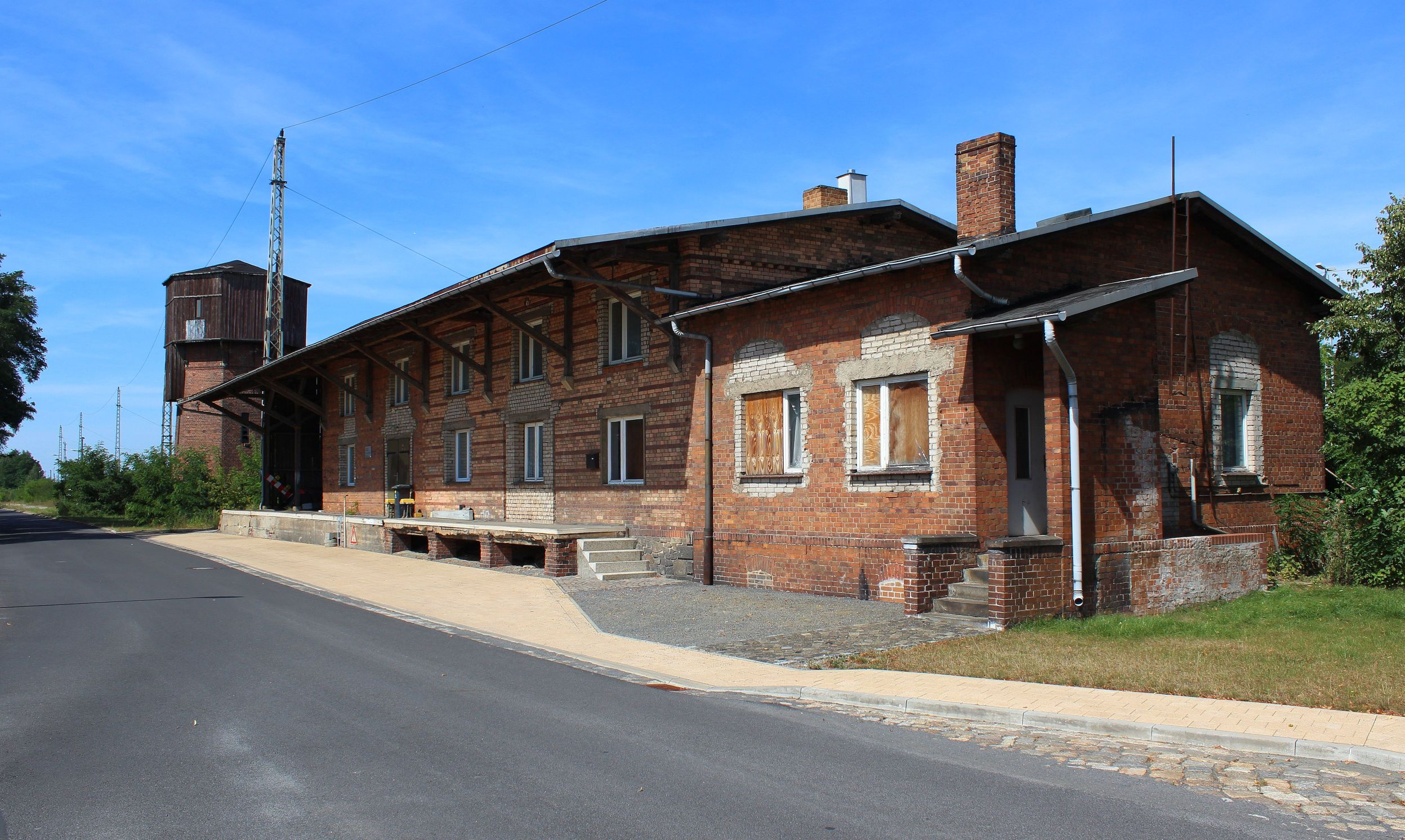 Bahnhof Elsterwerda-Biehla.